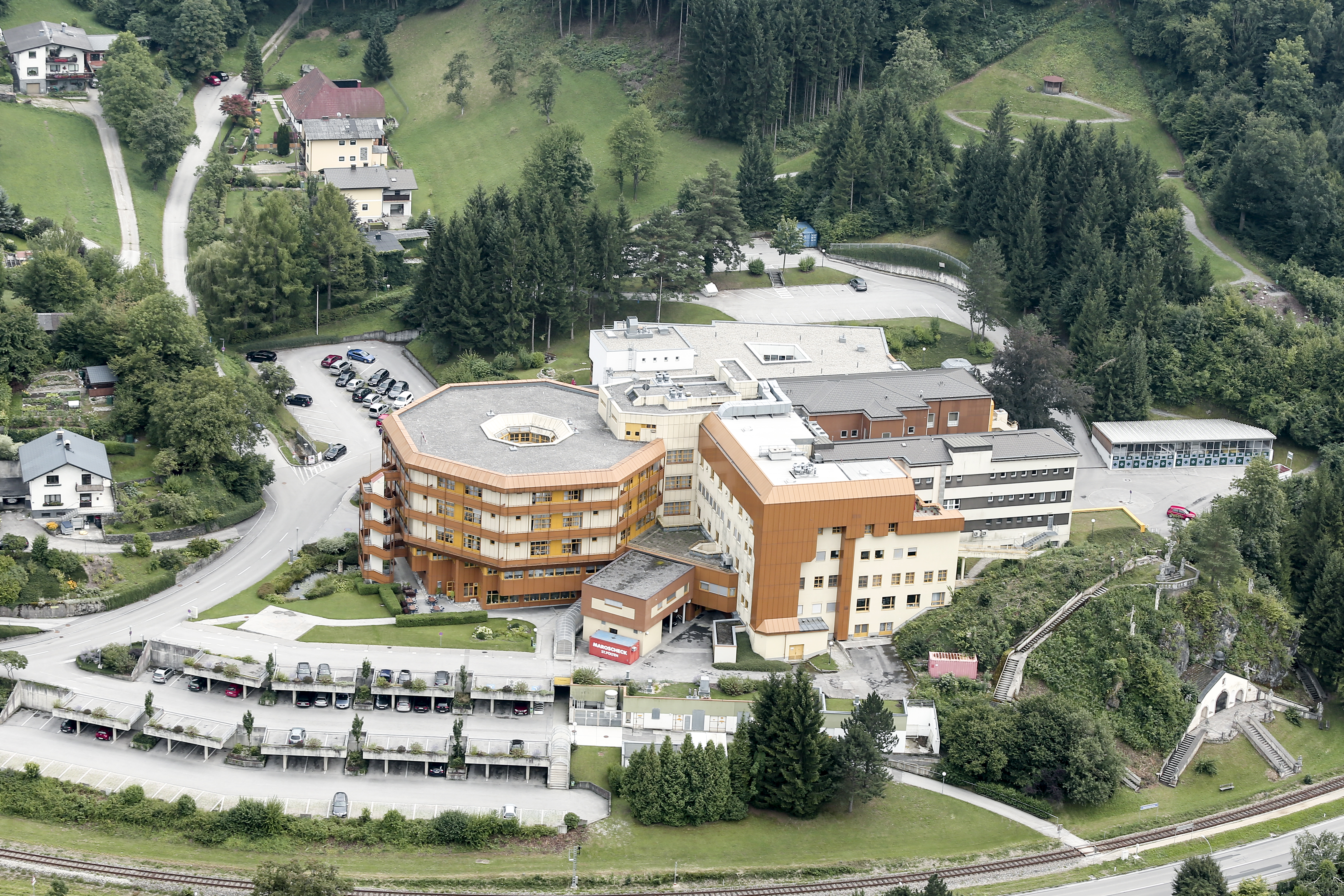 Krankenhaus Lilienfeld von oben